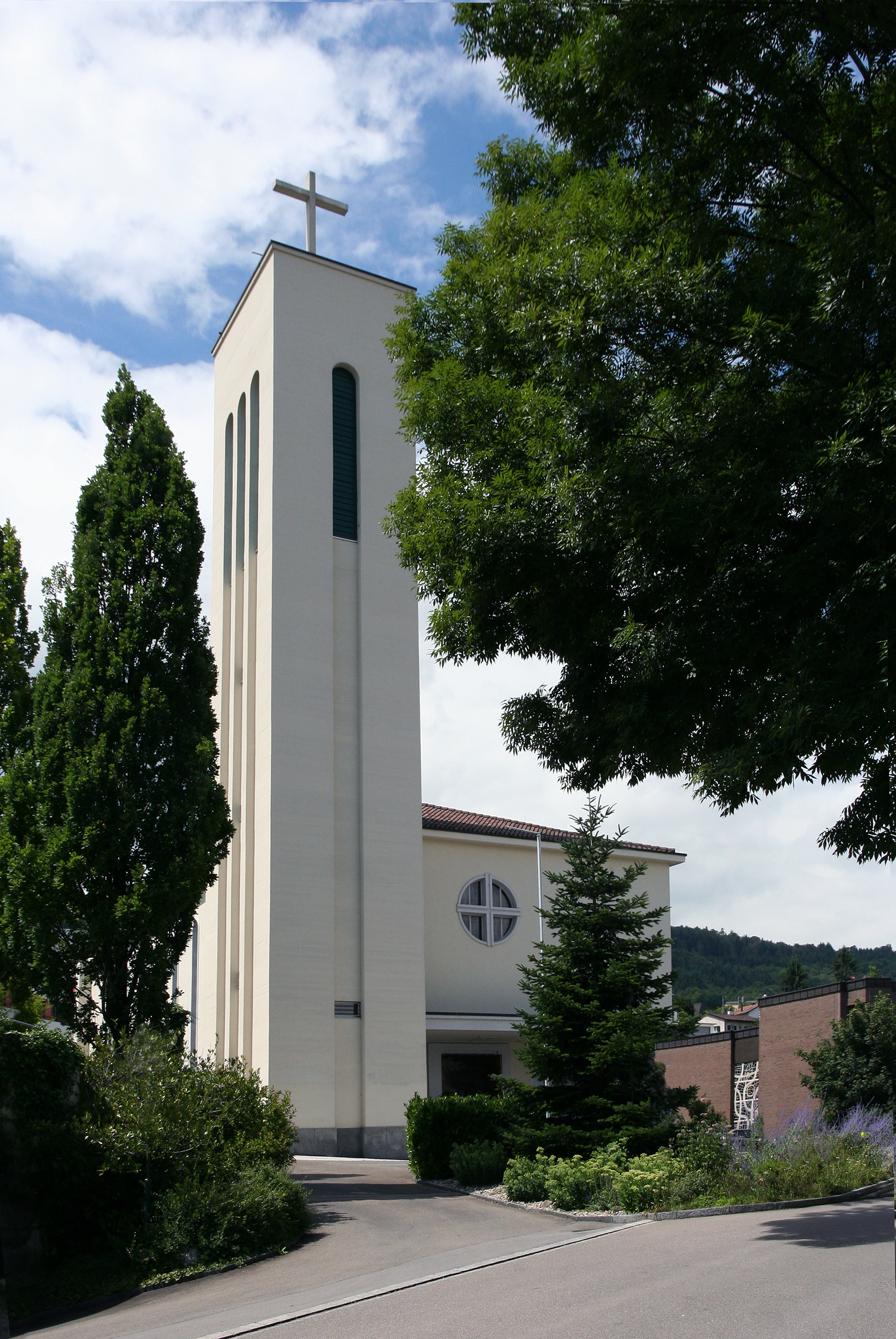 Römisch-katholische Pfarrkirche St. Josef Horgen, Kirchturm